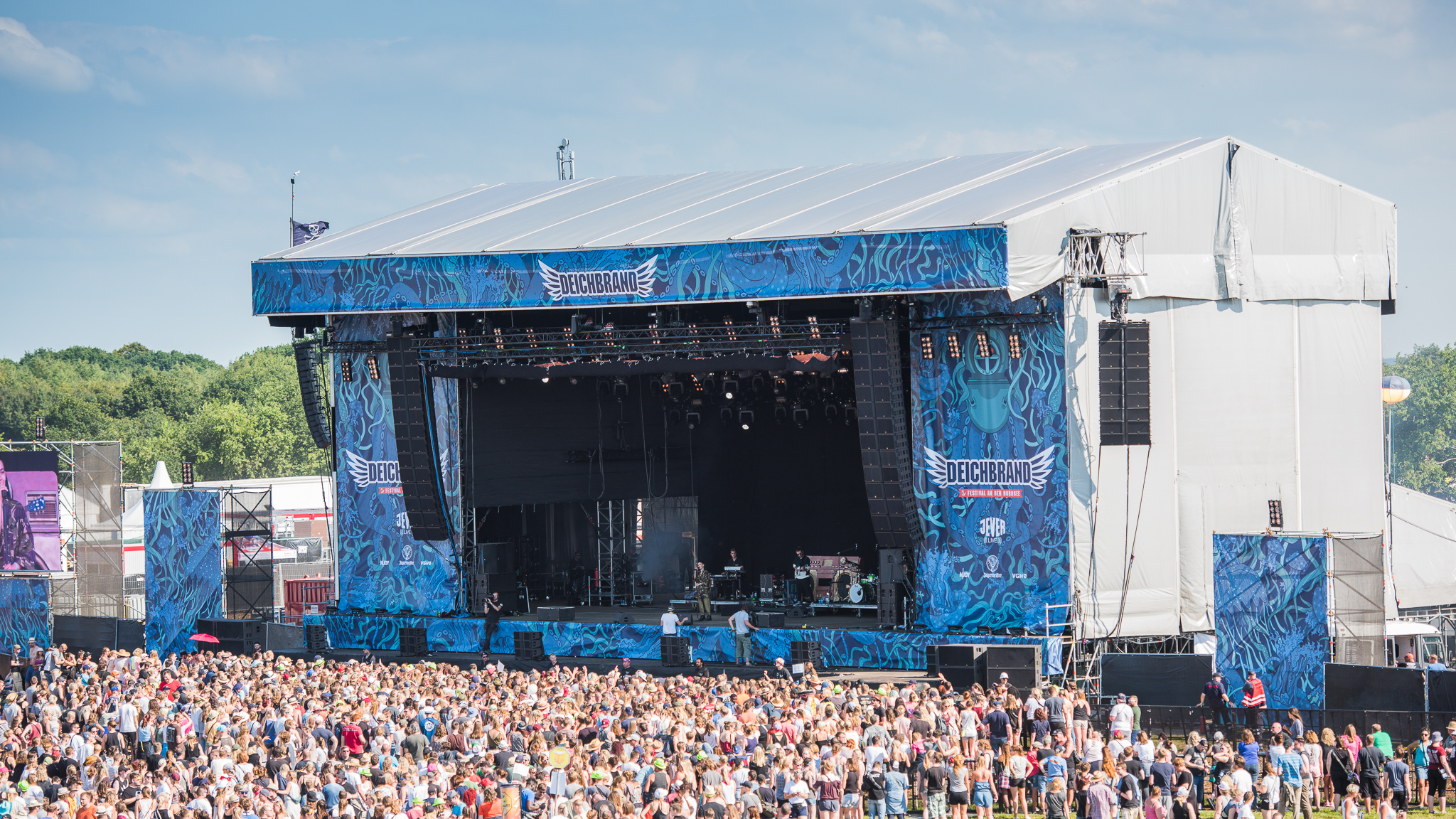 Deichbrand,ESK Events & Promotion GmbH,Festival,Konzert,Livekonzert,Livemusik,Sea-Airport Cuxhaven/Nordholz,See-Flughafen Cuxhaven/Nordholz,Seeflughafen Cuxhaven/Nordholz,Water Stage